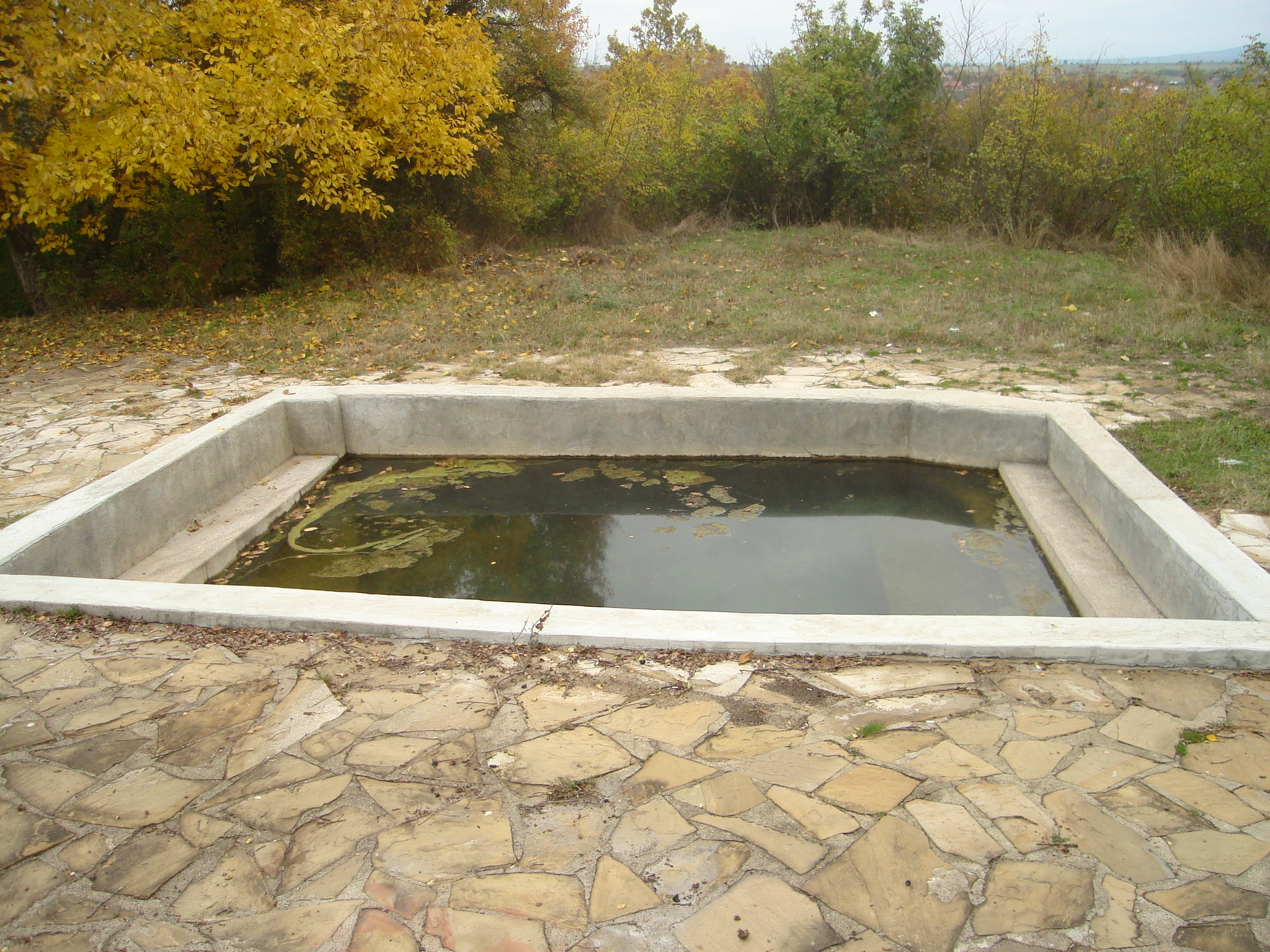 "Краставото изворче"